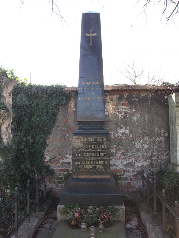 Gschwindt Ernő (Budapest, 1881. szeptember 27. – Budapest, 1932. augusztus 29.) a Ferencvárosi Torna Club (FTC) sportegyesület elnökének sírja Budapesten. Kerepesi temető: J. 290.